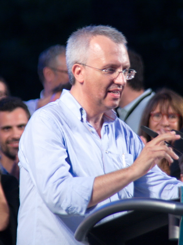 Josep Maria Forné a l'acte de presentació de tots els candidats de la llista Junts pel Sí a Barcelona, al Psg.Lluís Companys. (28-8-2015)